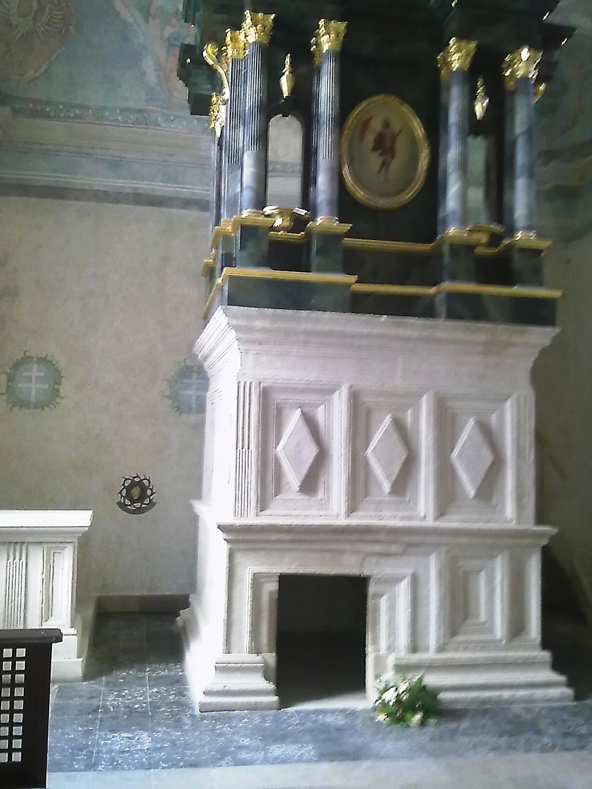 Miechów, kaplica grobu Chrystusa, XVI